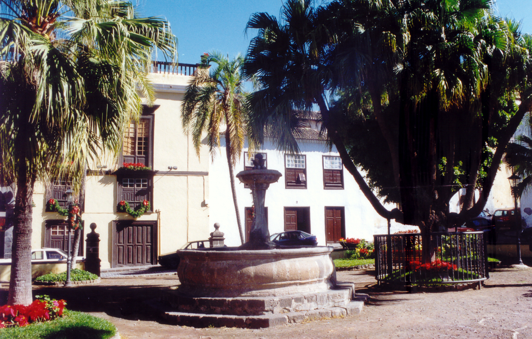 Plaza de la Pila, Icod de los Vinos, Tenerife, Canarias